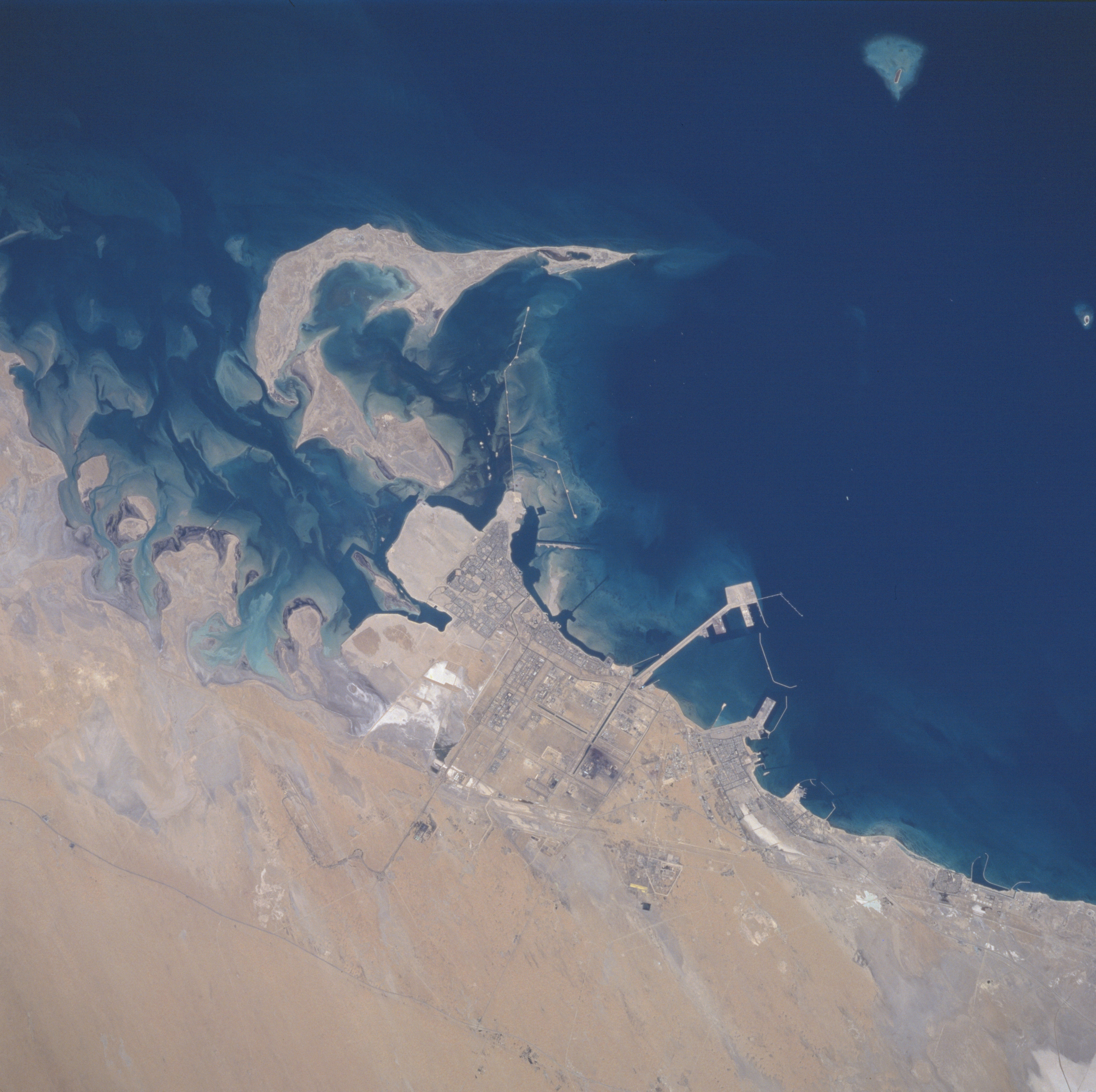 Al Jubayl, Saudi Arabia - June 1996 image description here